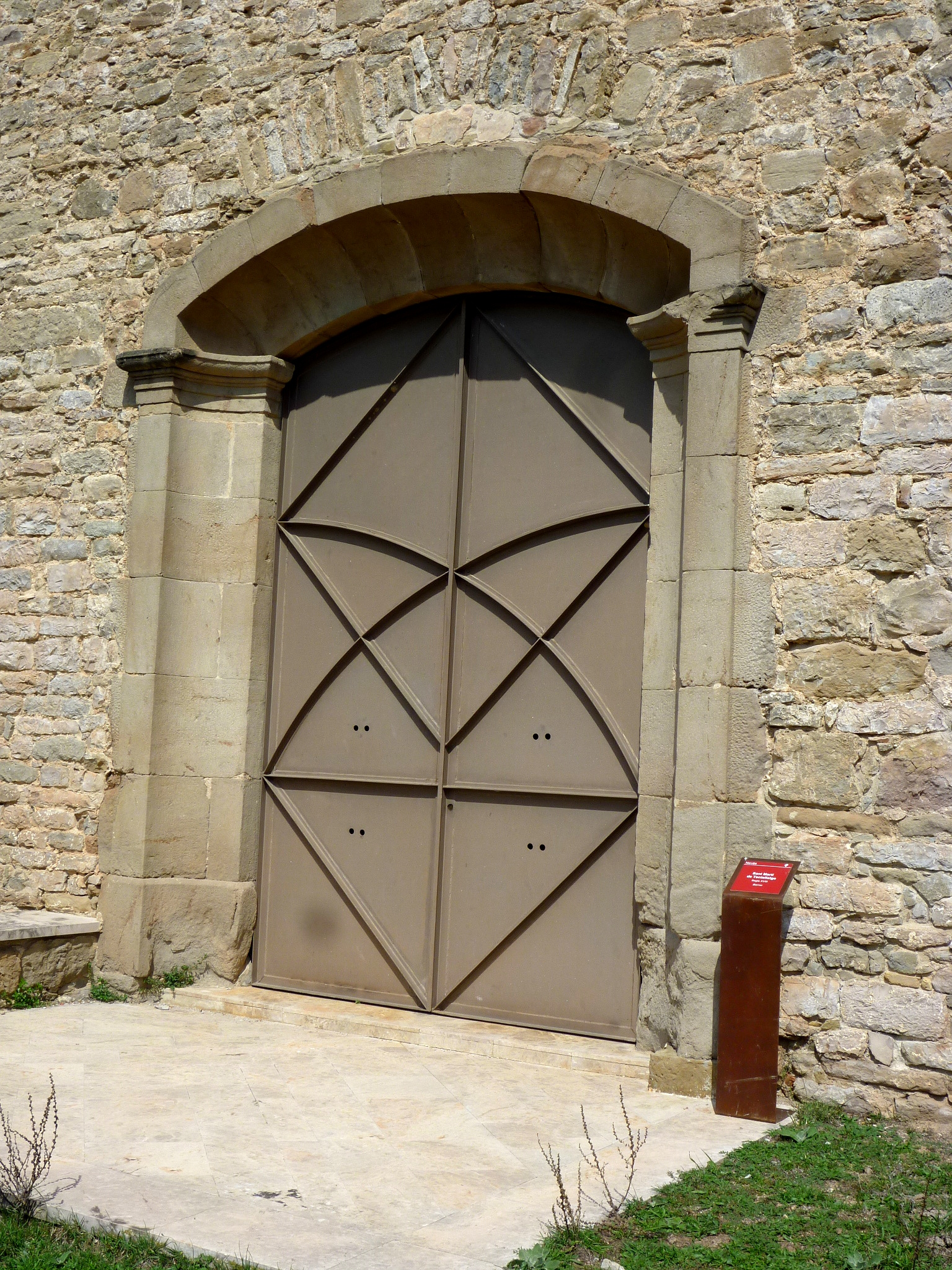 Església de Sant Martí de Tentellatge (Navès): Portal